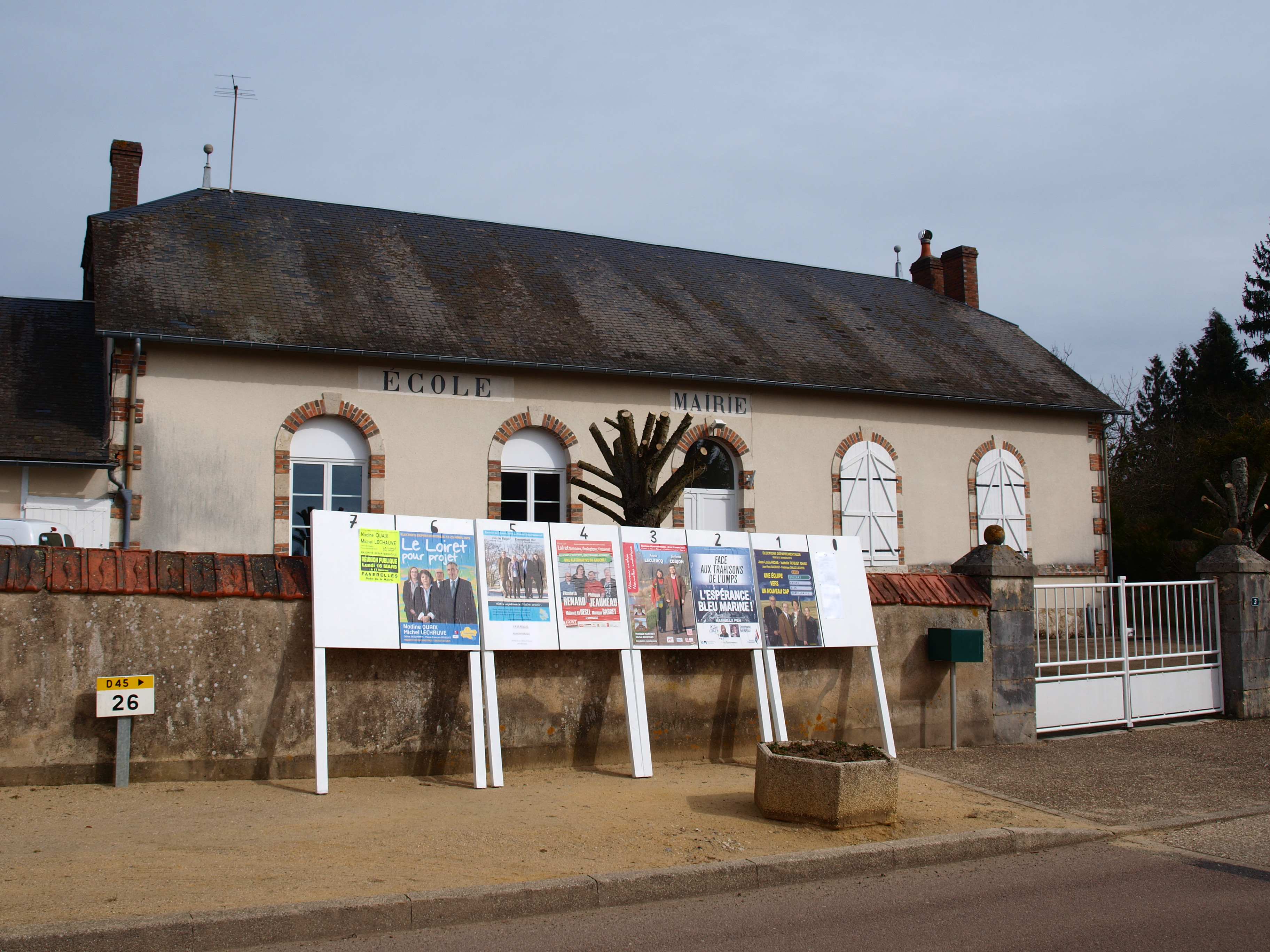 Élections départementales françaises de 2015 : l'affichage électoral légal.